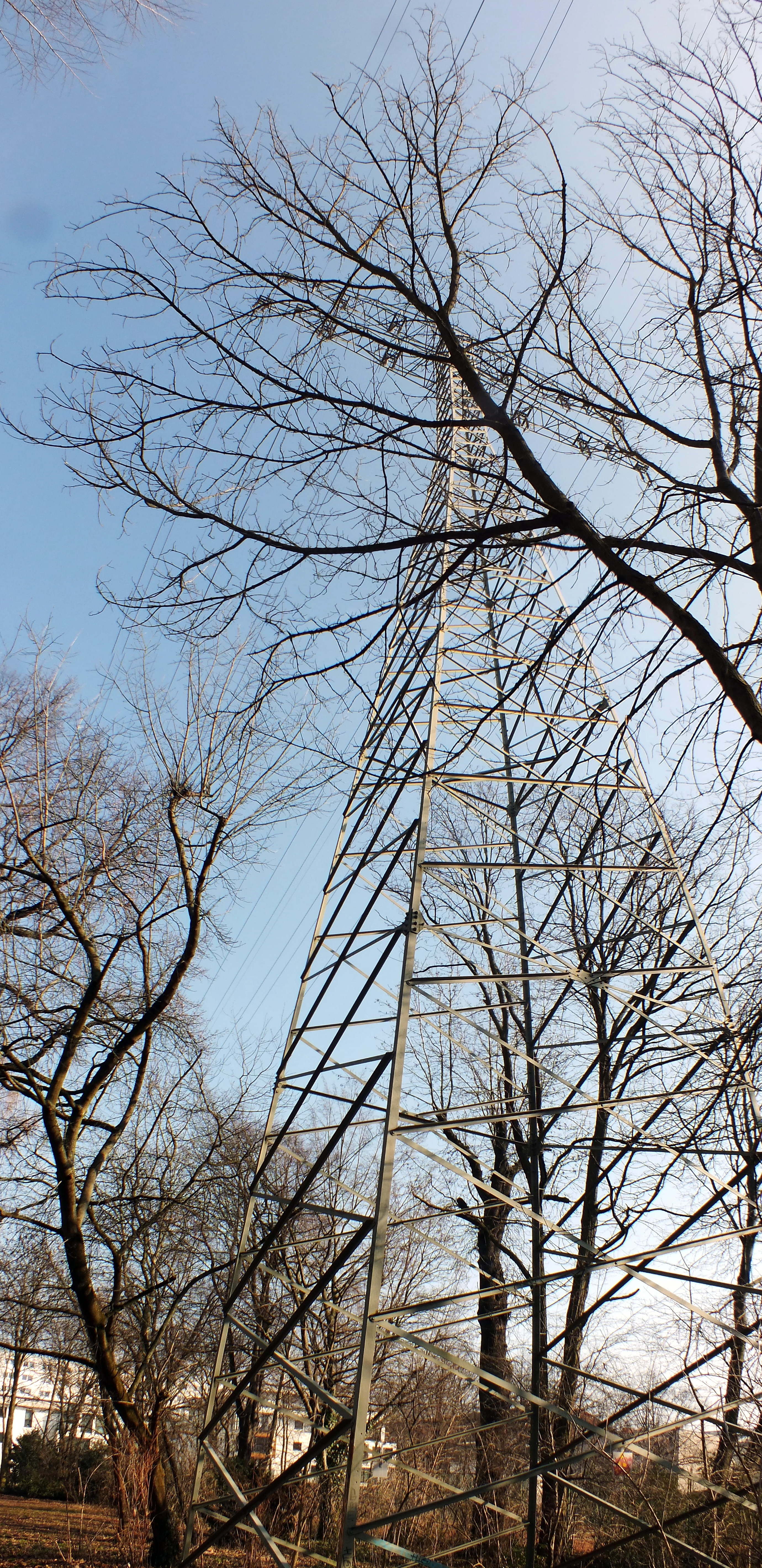 Gutspark Lichtenberg, Bezirk Lichtenberg von Berlin: Starkstrom-Freileitung (110 kV) geht quer rüber